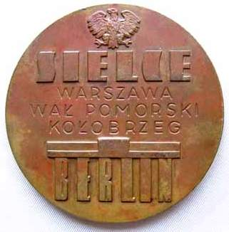 Medal z brązu 3 Pomorskiej Dywizji Piechoty; awers